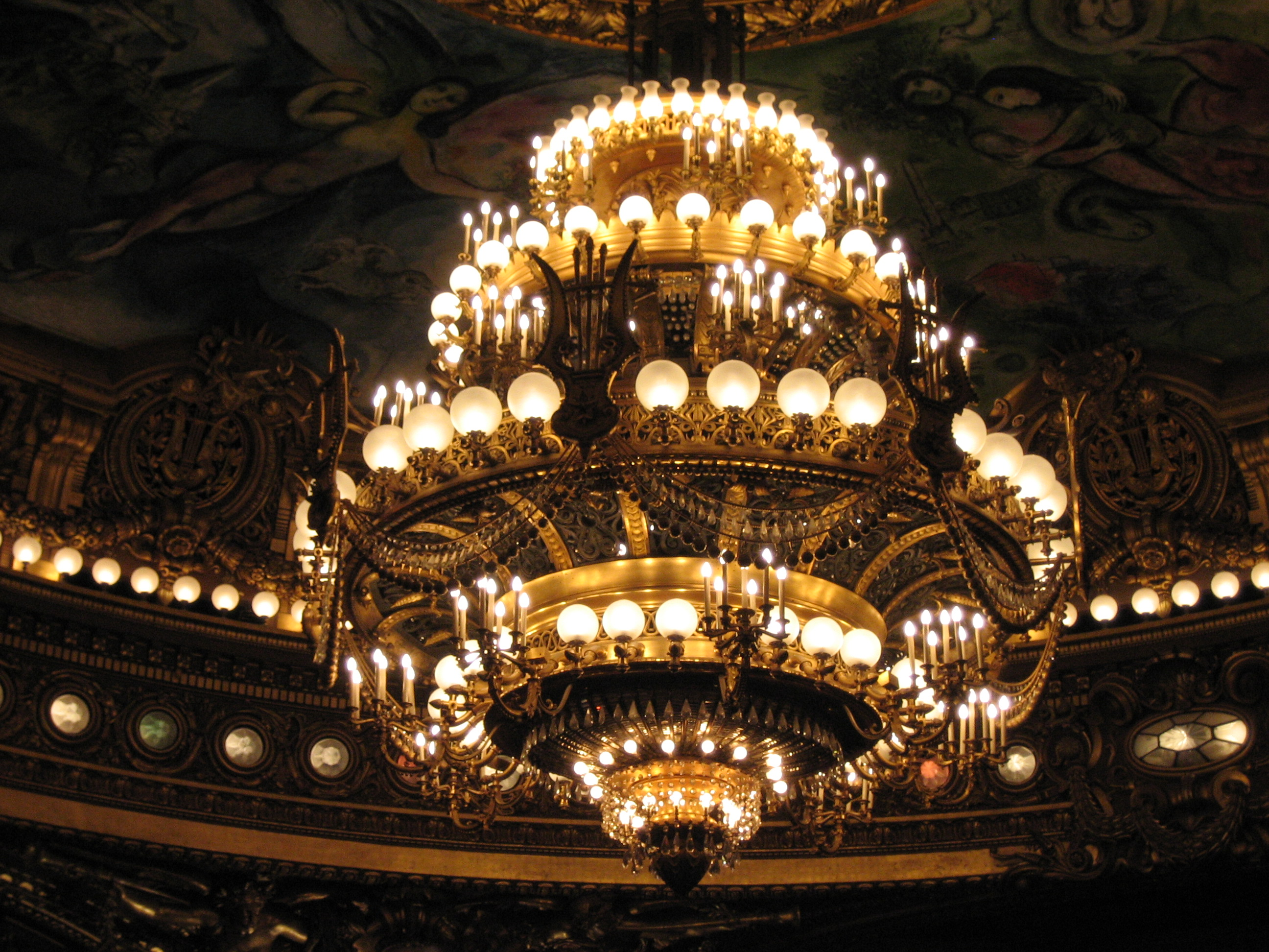 Le lustre de la salle de spectacle Palais Garnier